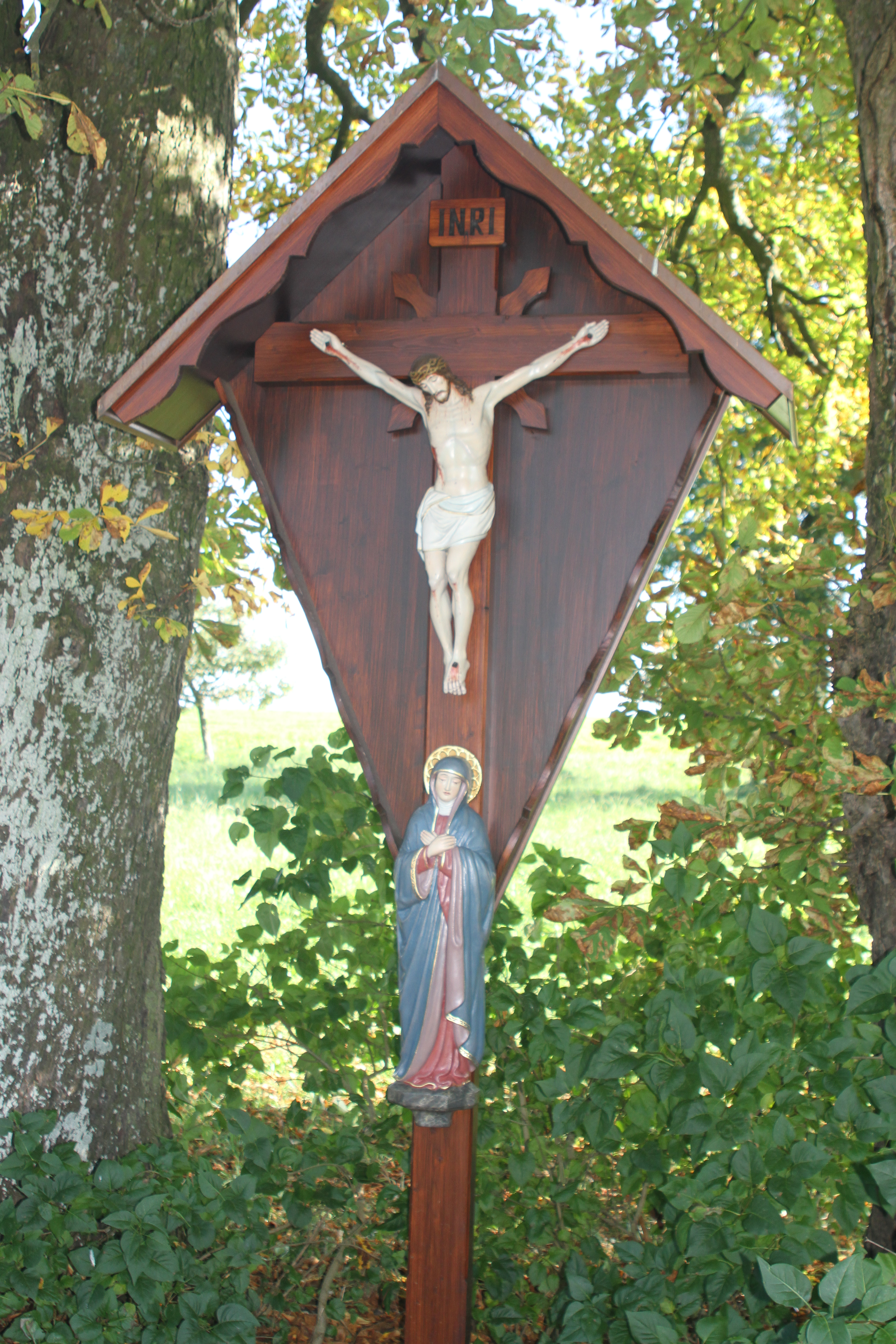 Primizkreuz unter zwei Kastanienbäumen, 2. Hälfte 19. JH.; an der Straße in Richtung Alling (südlicher Ortsrand).